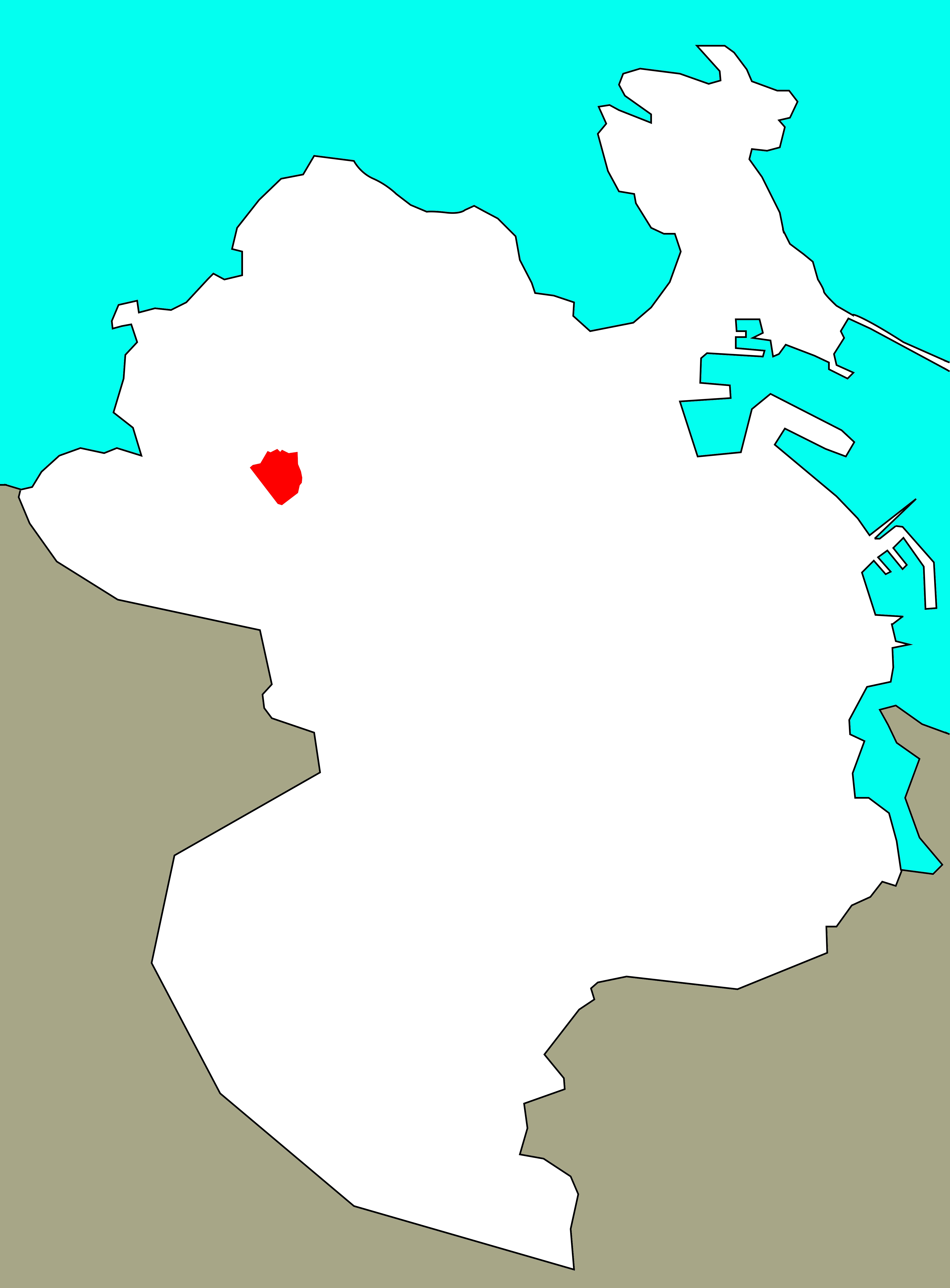 Situación de Mazaído no concello da Coruña.[1]